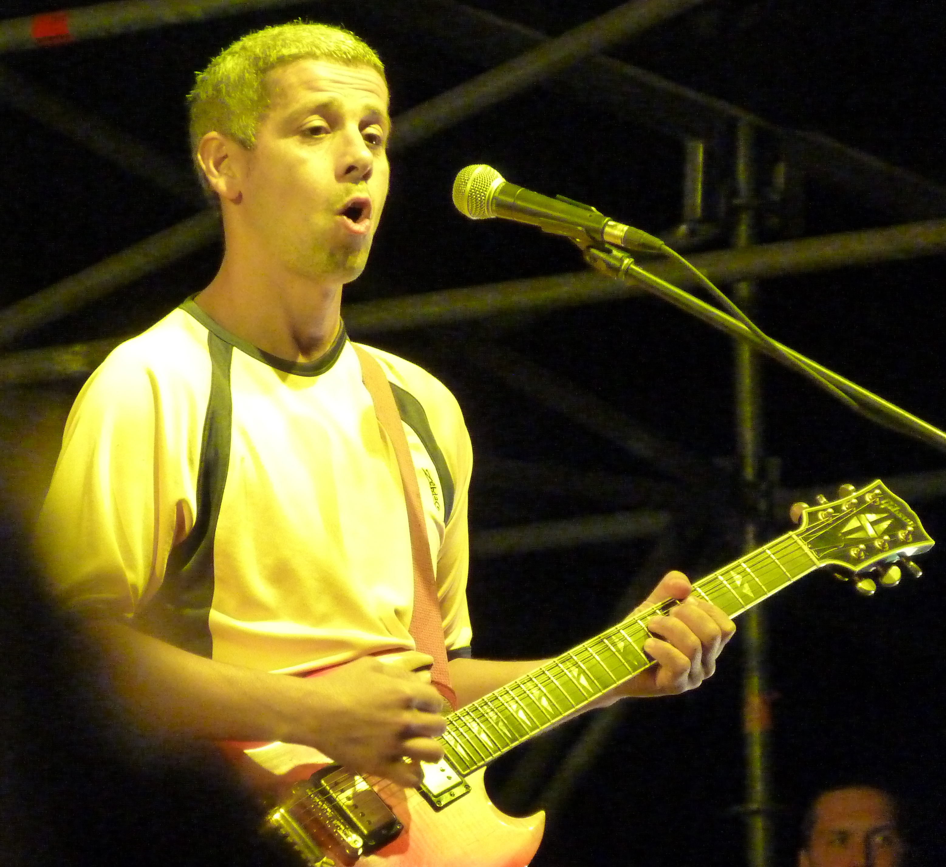 A felvétel 2013. szeptember 7 -én készült Budapesten, a Budapest Parkban (Budapest IX. Soroksári u. 60 szám). Manu Chao La Ventura. A kiváló hangulatú estén Manu nagyon sok ráadást játszott a lelkes közönségnek. José-Manuel Thomas Arthur Chao szülei emigráltak Franciaországba. Manu Párizs külvárosaiban szocializálódott, világzenét játszik. ©© Derzsi Elekes Andor, Budapest, 2013, You are authorised to use these photos and vids under Creative Commons – even for commercial, for profit purposes. Photos must be attributed to Derzsi Elekes Andor. All of the photos and vids in the Metapolisz DVD line are under Creative Commons and can be used even for commercial – for profit – purposes. Recommended Citation Derzsi Elekes Andor: Metapolisz DVD line Források: "Őrült Budapest!" – itt járt Manu Chao hozzáférés 20130910 Budapest Park hozzáférés 2013.0ö.10